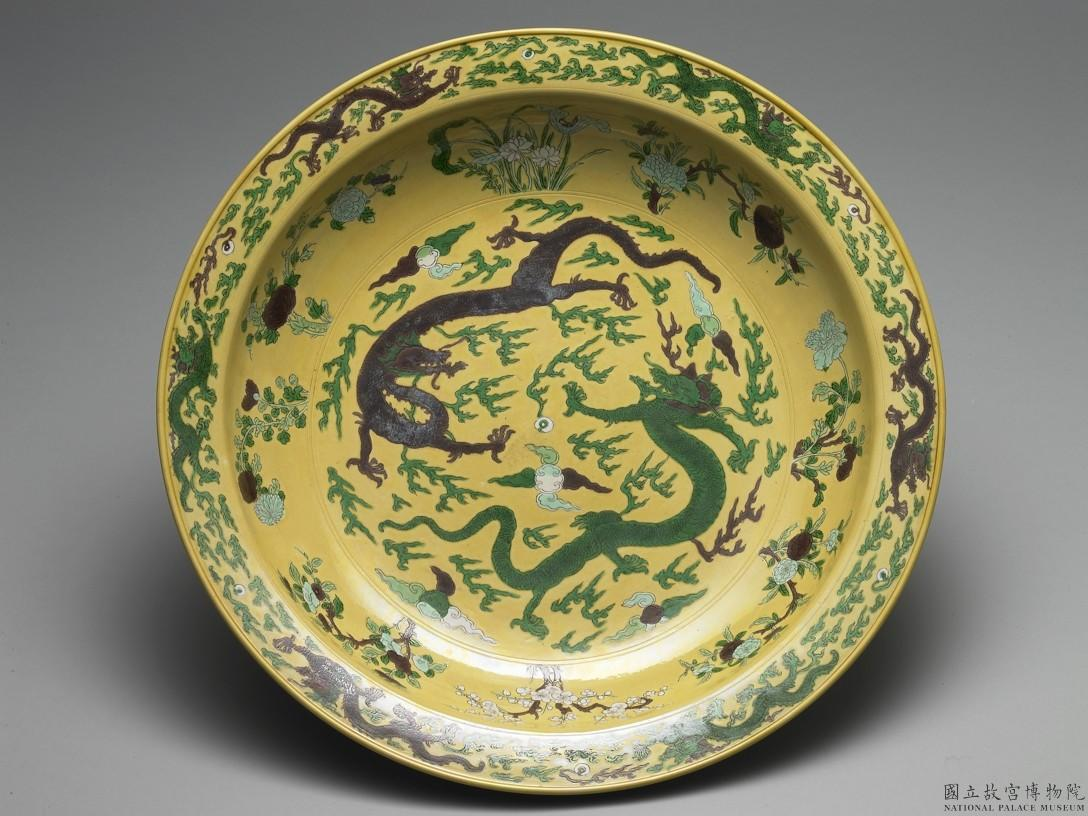 素三彩黃地褐綠雙龍紋盤